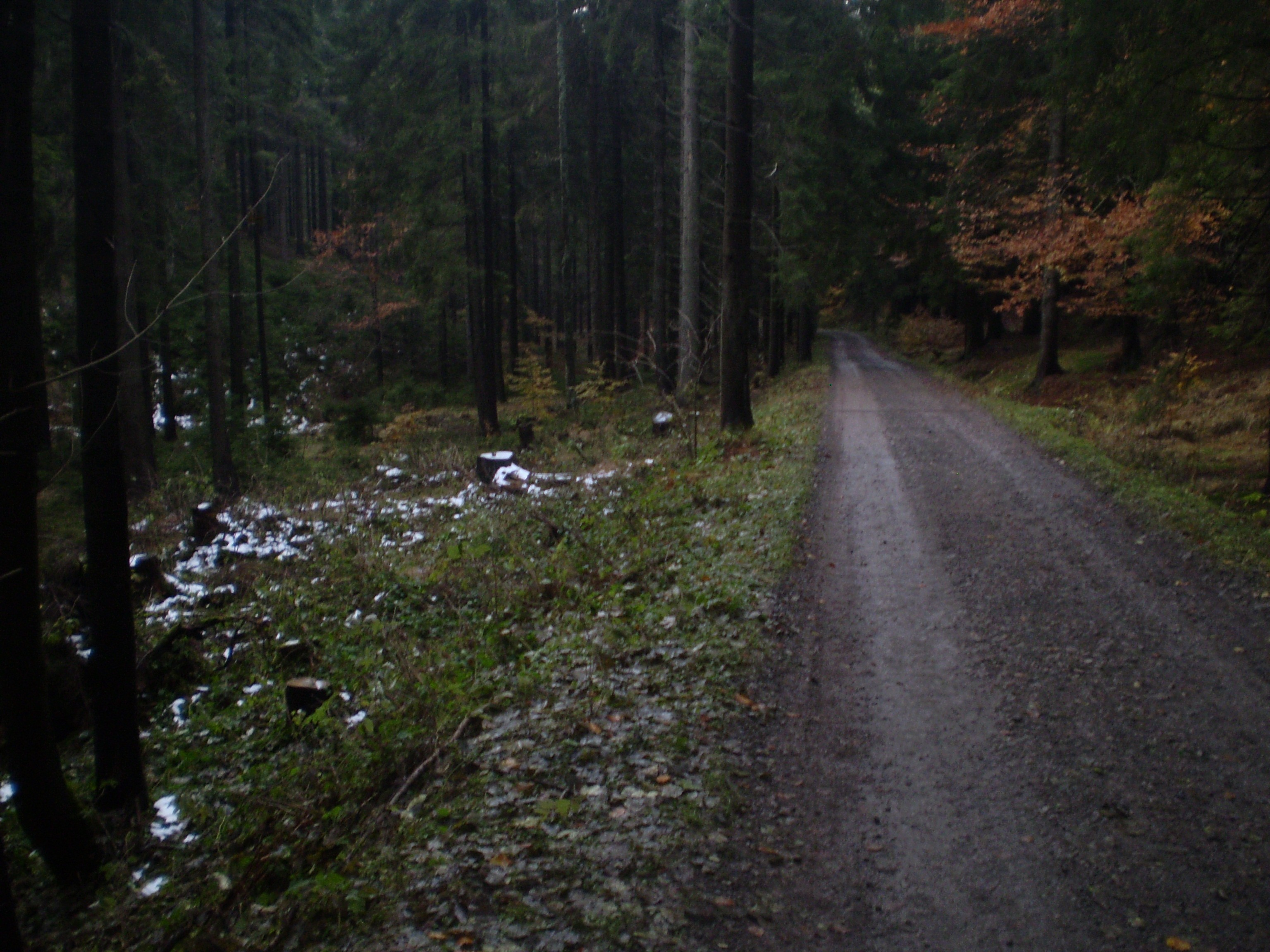 Uhelný důl v Orlických horách - pevnostní silnice Těchonín - Bouda